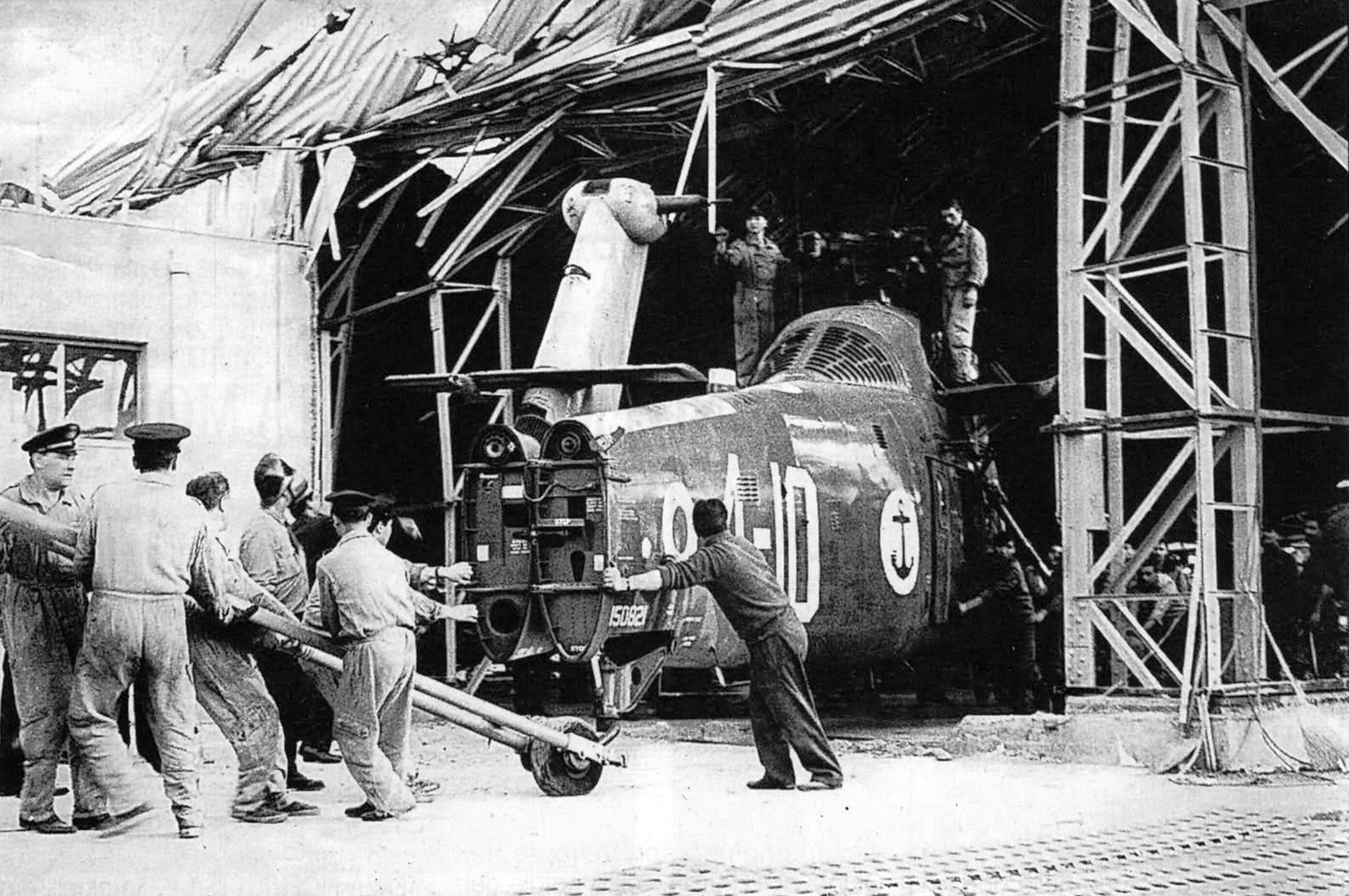 Elicottero Sikorsky SH-34J MM 150821 mentre viene portato in salvo dal personale, dopo la distruzione dell’hangar da parte del ciclone; il 4-10 velivolo rimase danneggiato sotto il secondo hangar in maniera talmente estesa da costringere ad un lavoro esteso di ricostruzione da parte della SABCA belga e venne poi ricodificato 4-03 dopo il ritorno in linea, per non lasciare buchi di numerazione tra questo mezzo ed i rimpiazzi arrivati dagli Stati Uniti.